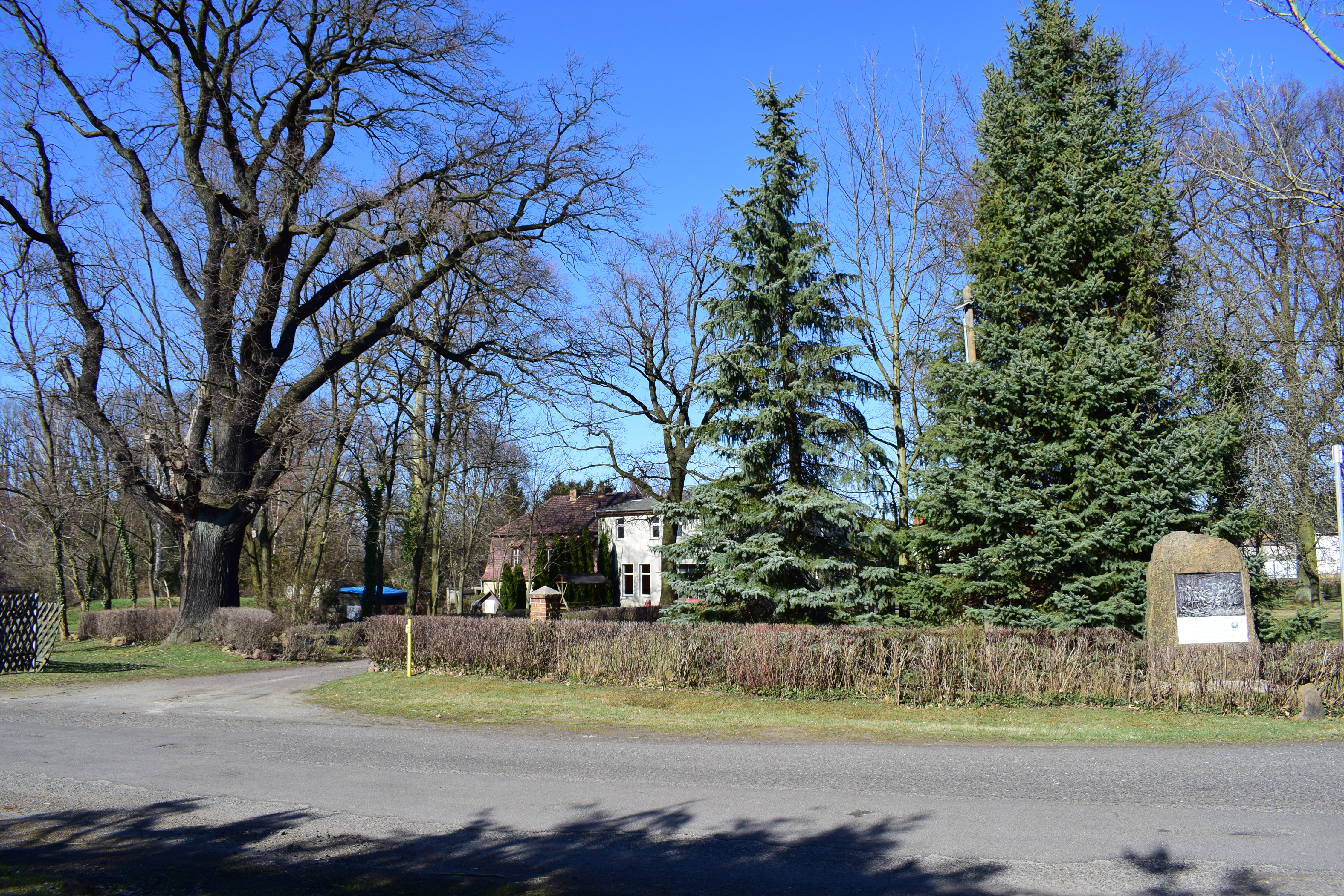 Grundstück auf dem das ehemalige Herrenhaus derer von Hagen einst stand. Vorhanden ist noch der älter Teil des Herrenhauses (links im Bild). Das Gebäude der Freiwilligen Feuerwehr Schönheide steht jetzt auf dem Platz des damaligen "neuen" Herrenhauses.